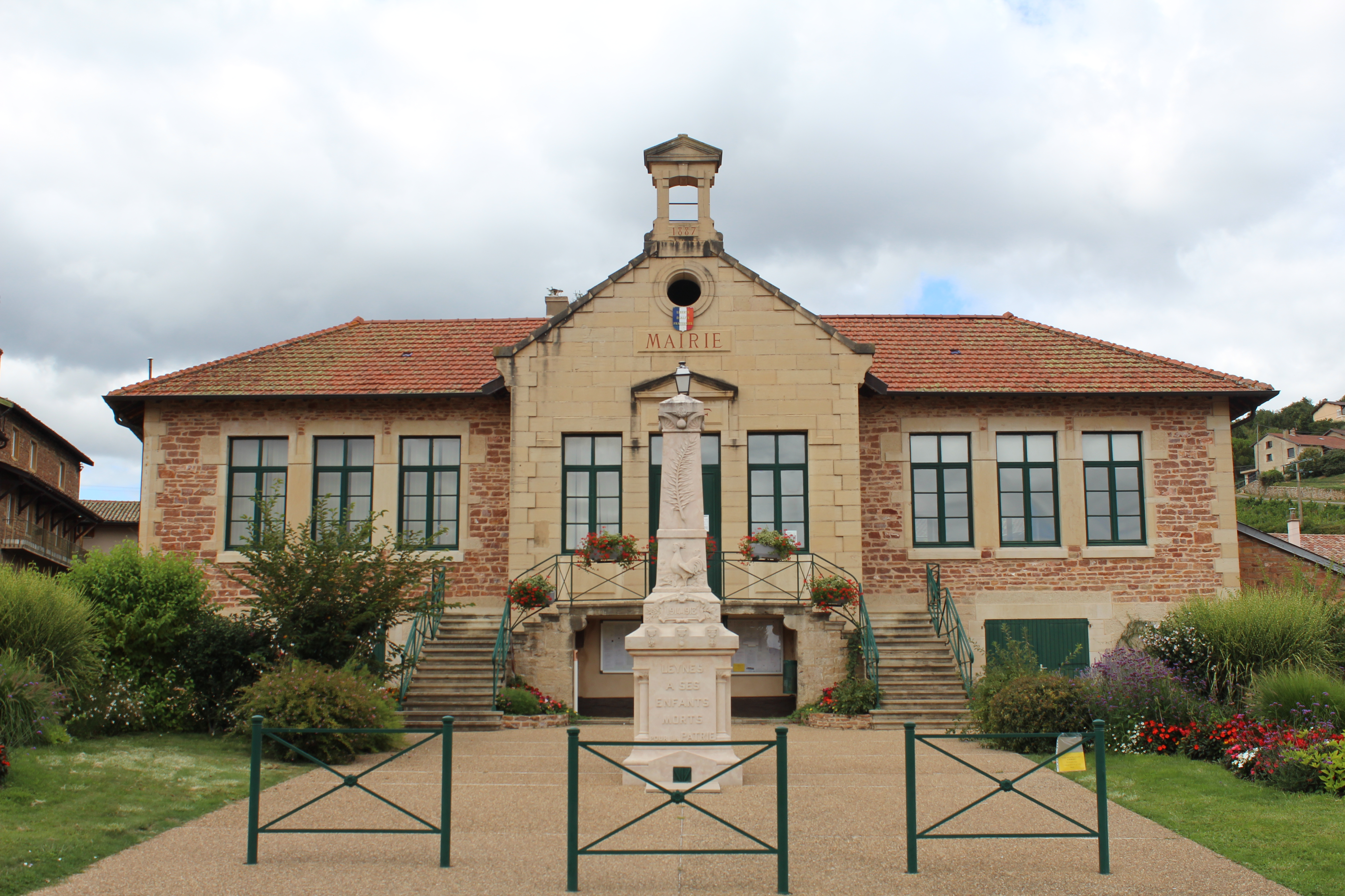 Mairie de Leynes.